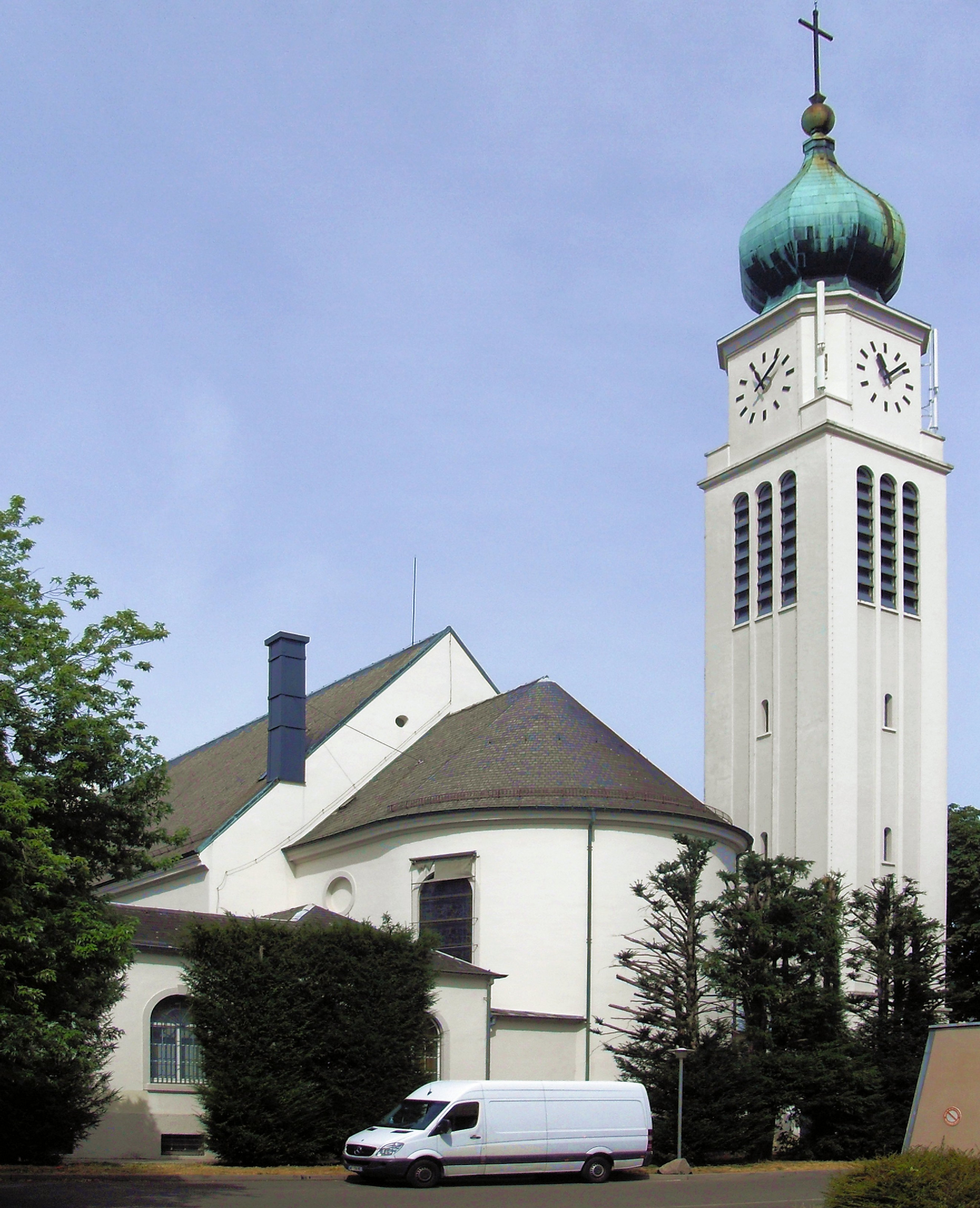 L'église Saint-Antoine de Bourtzwiller, commune de Mulhouse, côté sud-est